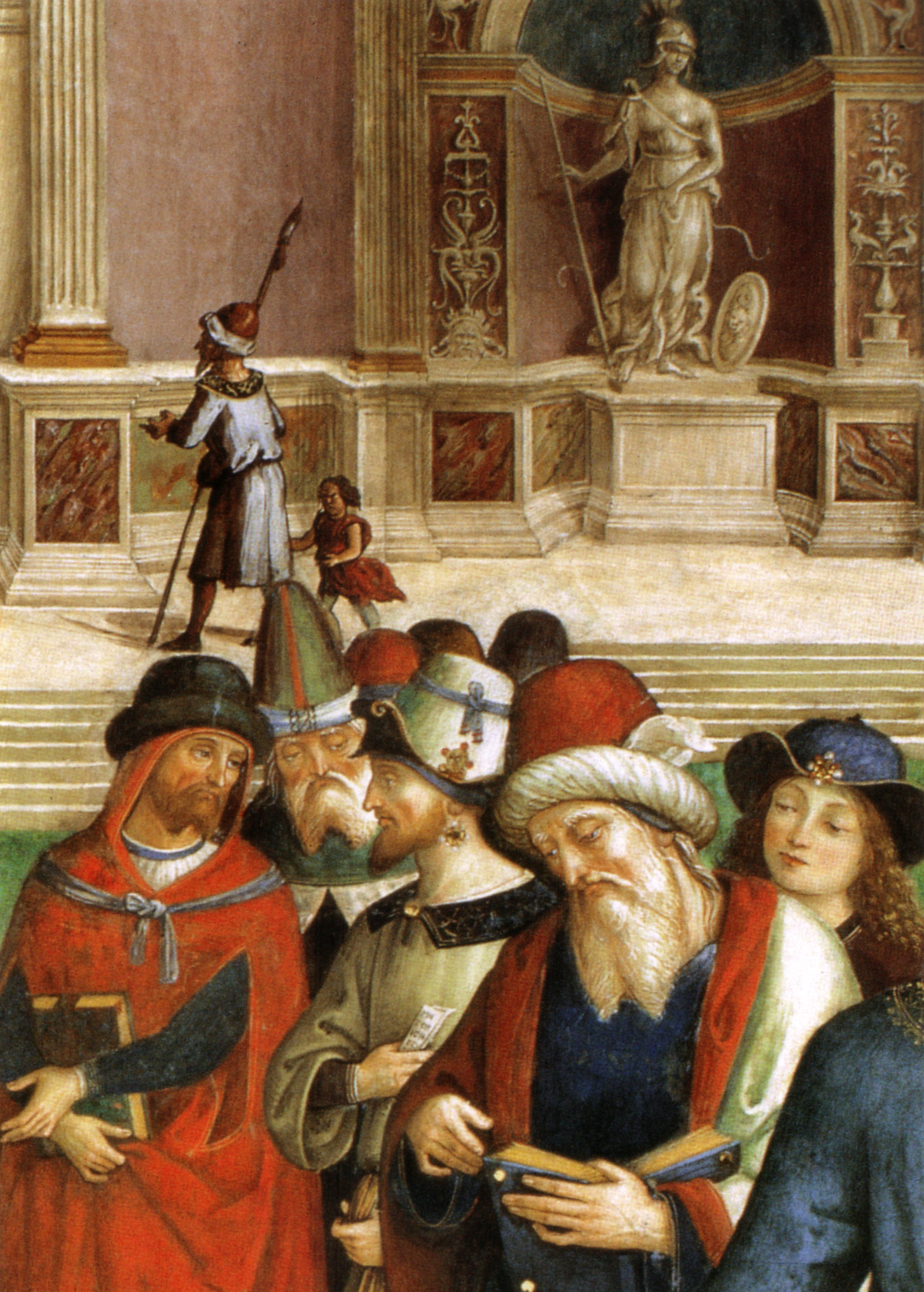 Pinturicchio, cappella baglioni, dettaglio